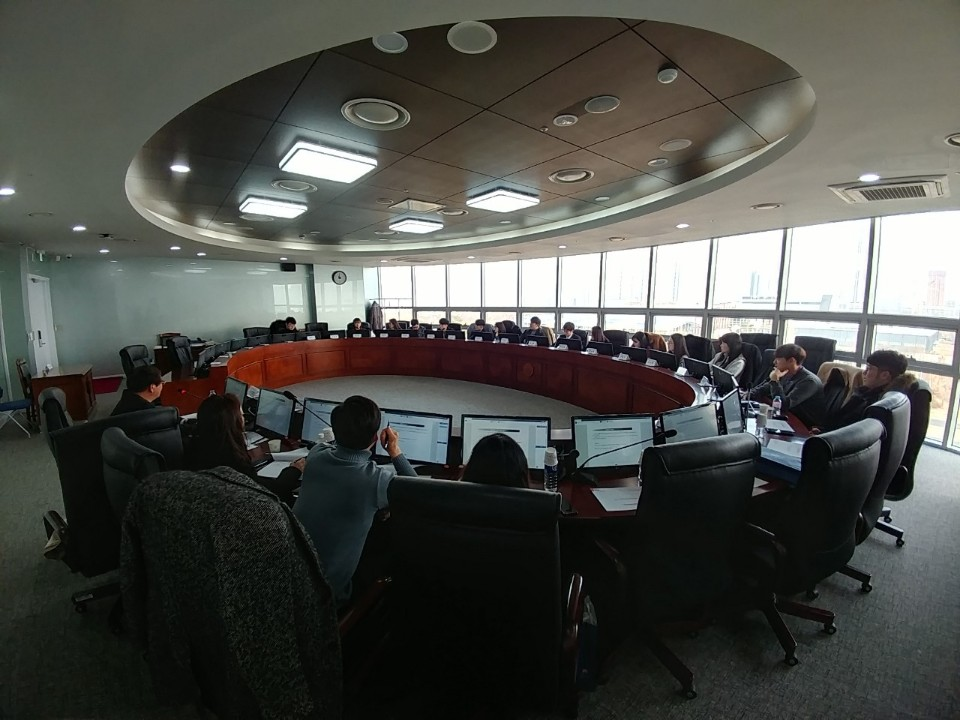 정기회의 사진